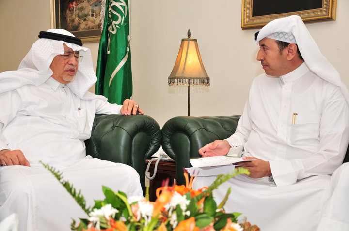 صور للفنان فيصل الخديدي مع وزير الثقافة والإعلام السعودي عبدالعزيز خوجه